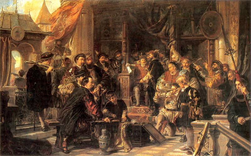 Władysław Łuszczkiewicz: Ofiarowanie kura bractwu strzeleckiemu